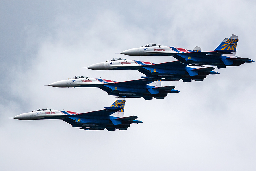 Четвёртый день Международного военно-технического форума «Армия-2016». Московская область, парк «Патриот», 9 сентября 2016.